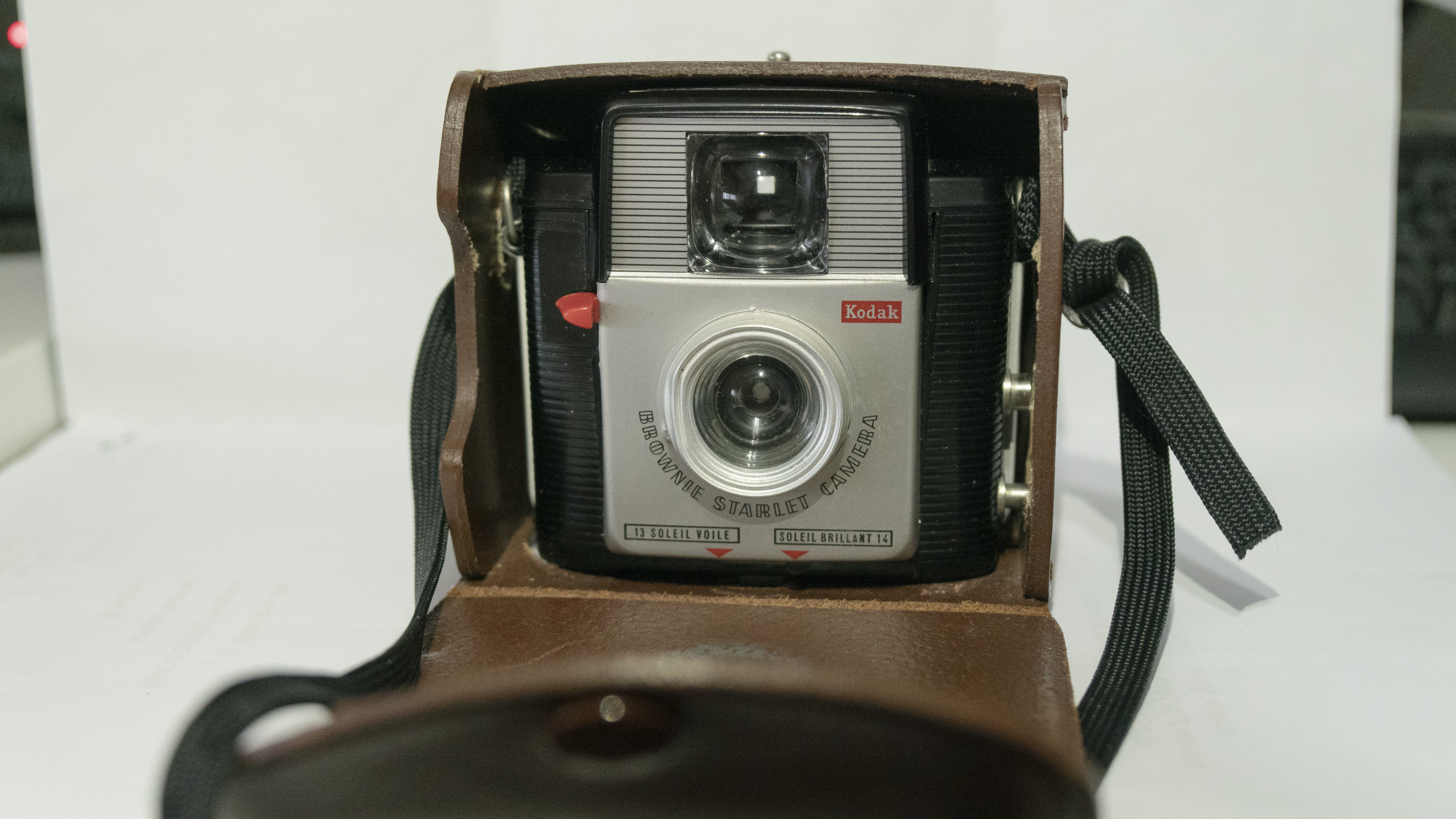 Frontal da cámara Kodak Brownie Starlet dos anos 40. É a cámara posterior ás cámaras de caixón